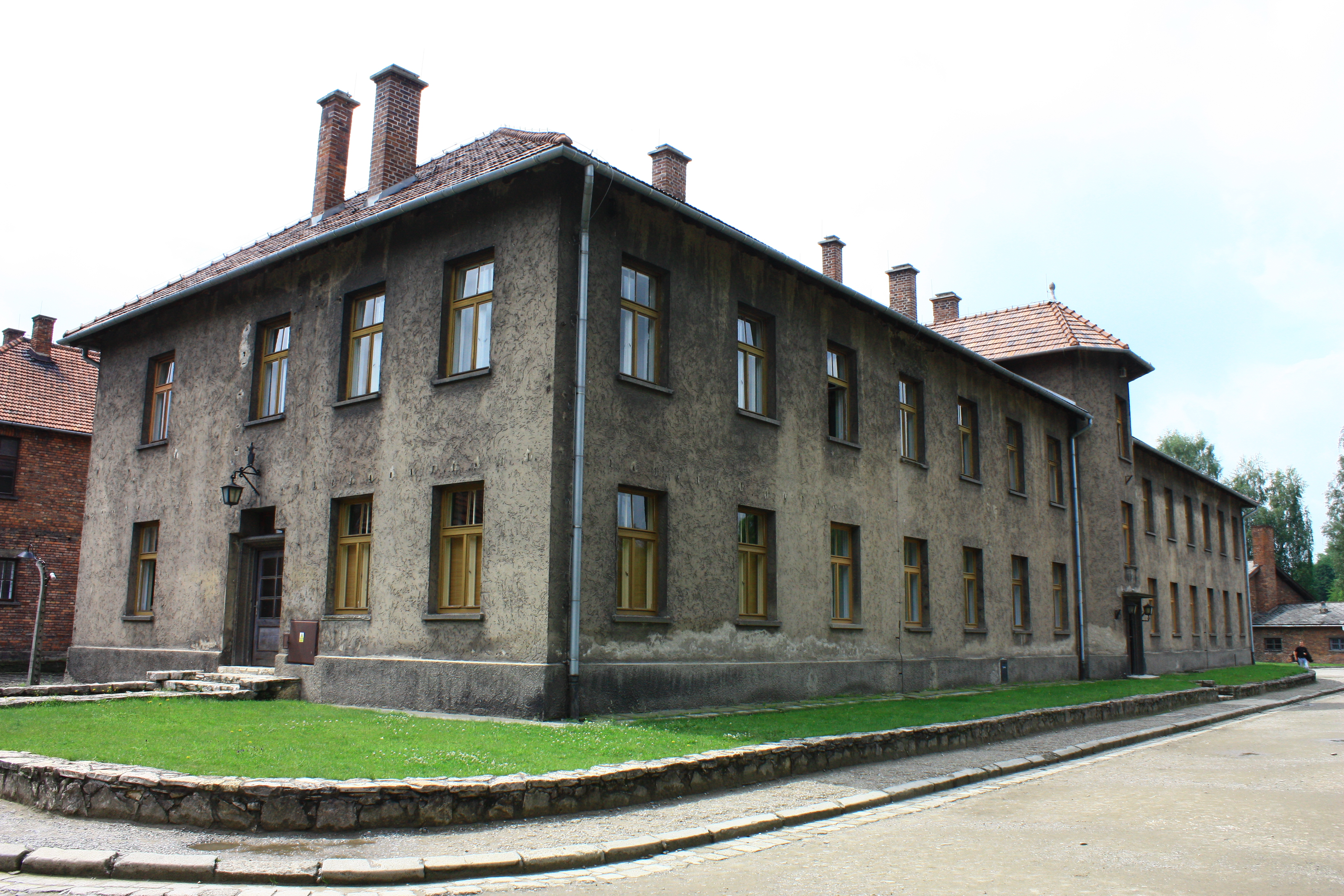 Oświęcim, zespół Byłego Nazistowskiego Niemieckiego Obozu Koncentracyjnego i Zagłady Ausc…, 1940-1945